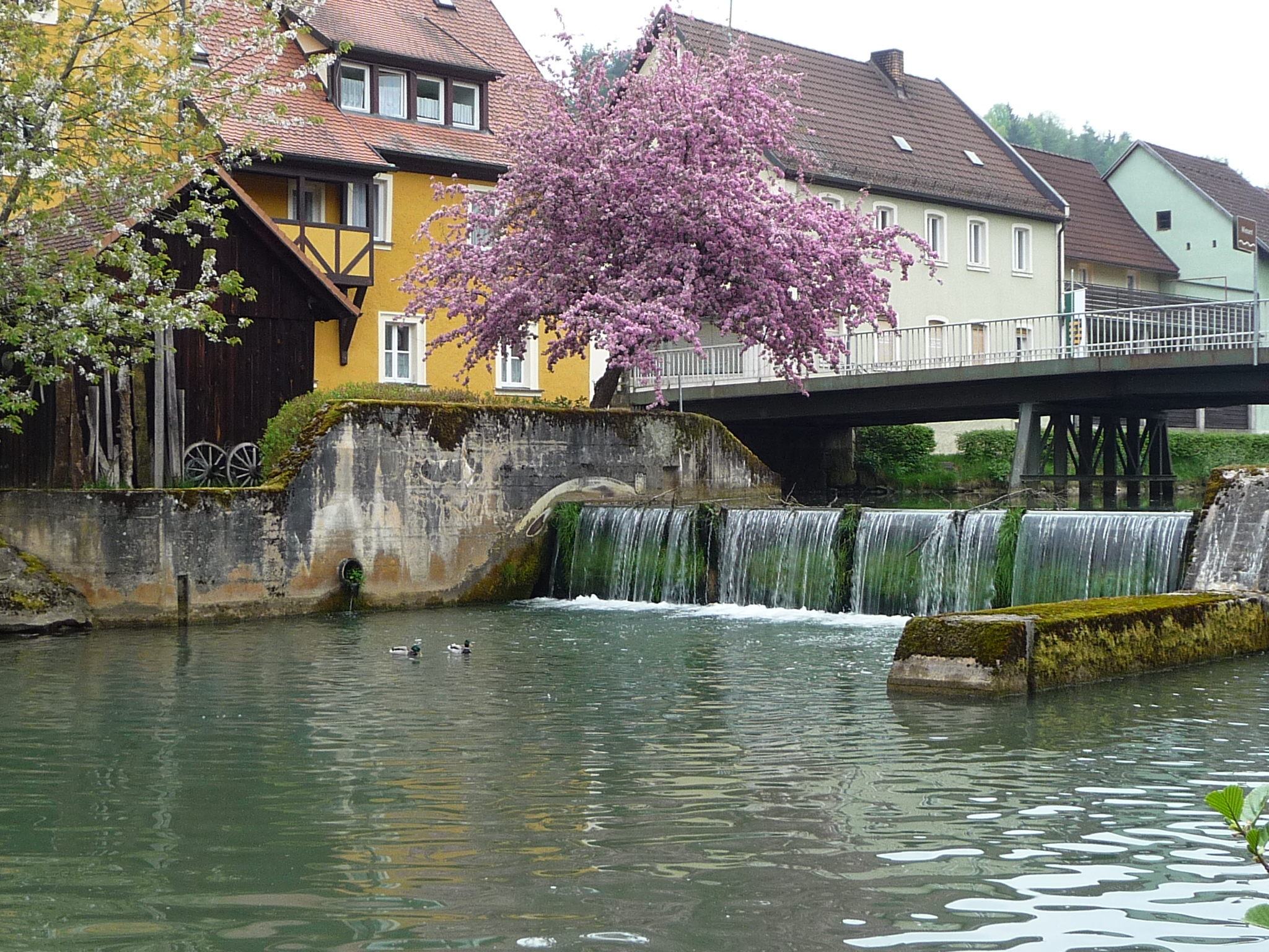 Waischenfeld in der Fränkischen Schweiz (Oberfranken)